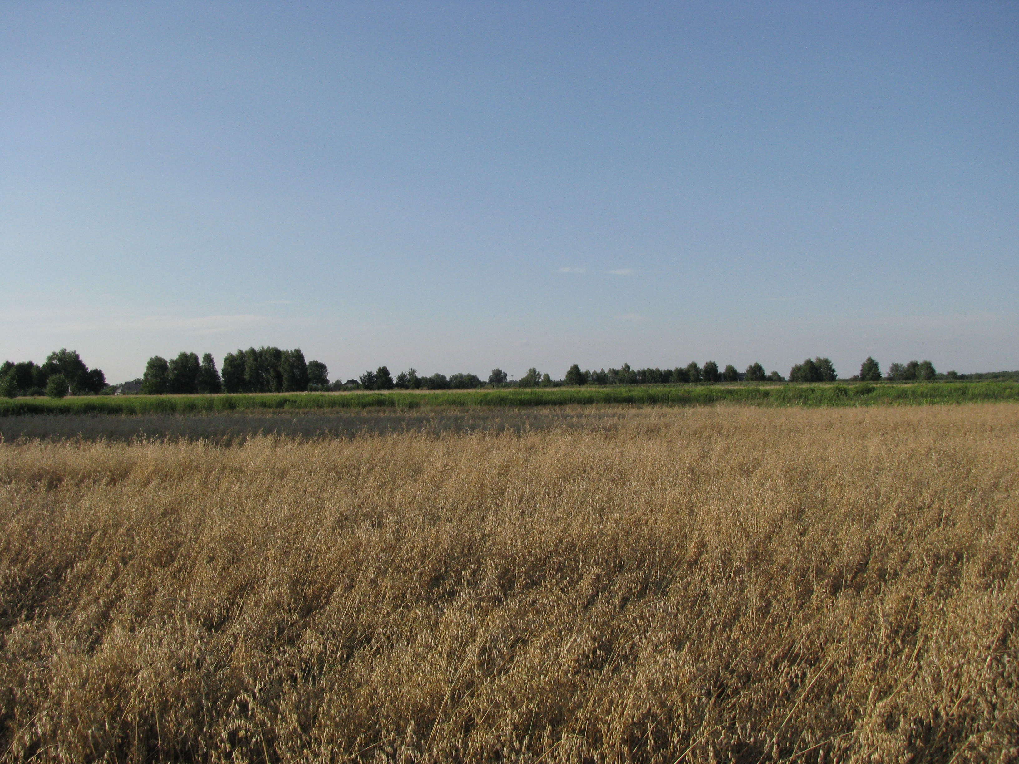 Droga w stronę lasu od strony szkoły